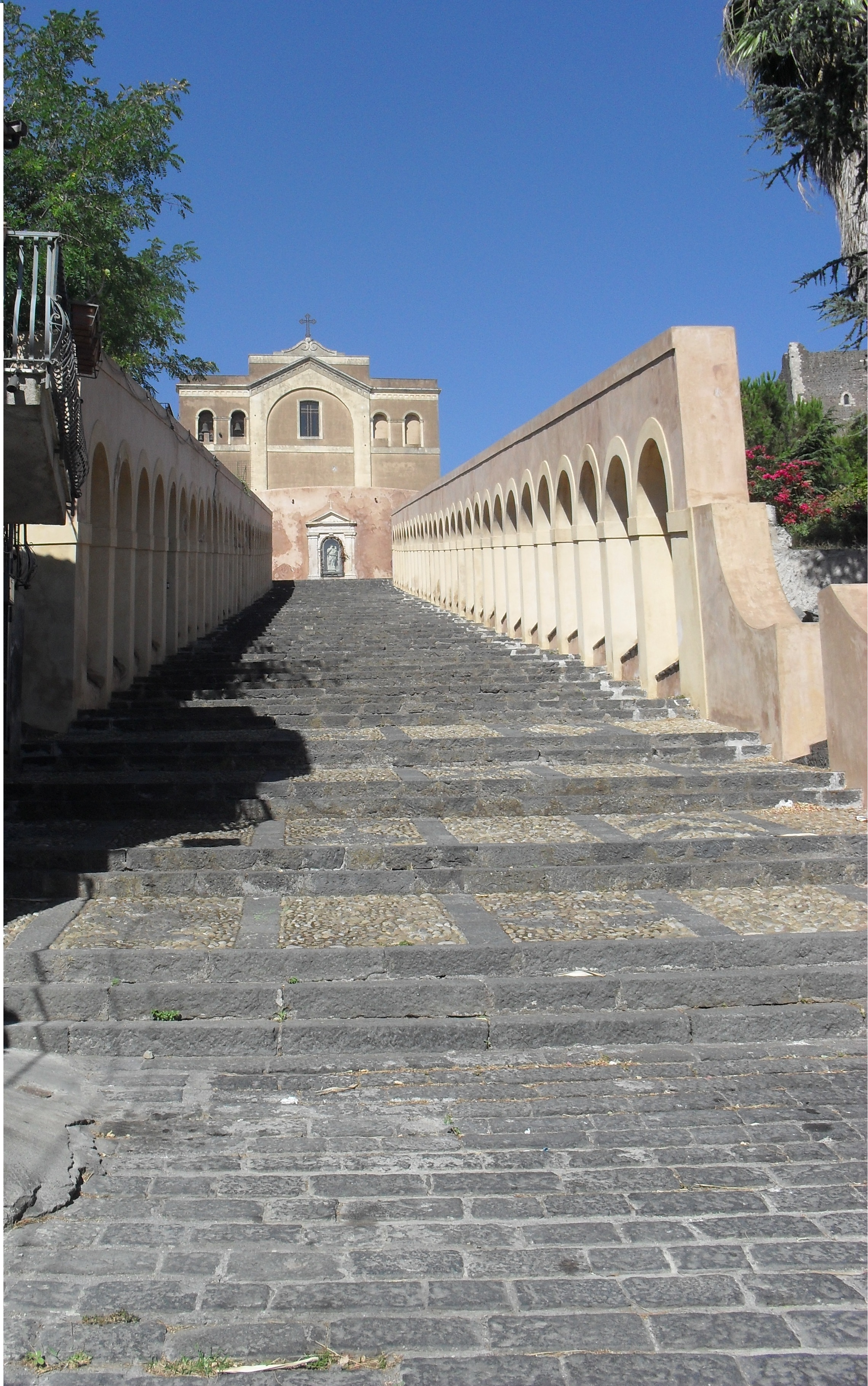 Scalinata Settecentesca della Matrice a Paternò Summary Scalinata Settecentesca della Matrice